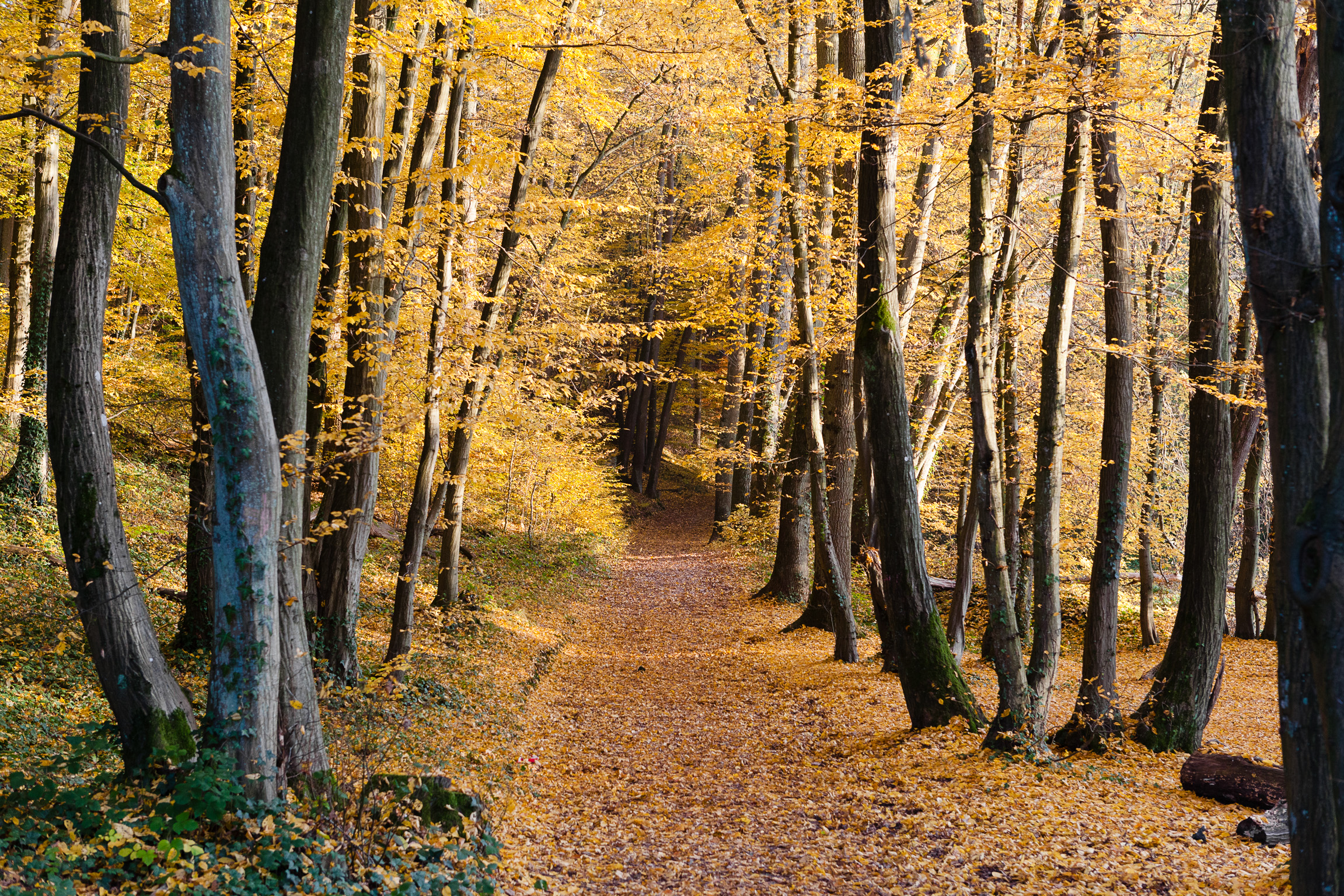 Radwanderweg Naurod-Igstadt im Wickerbachtal bei Auringen, Landschaftsschutzgebiet Stadt Wiesbaden